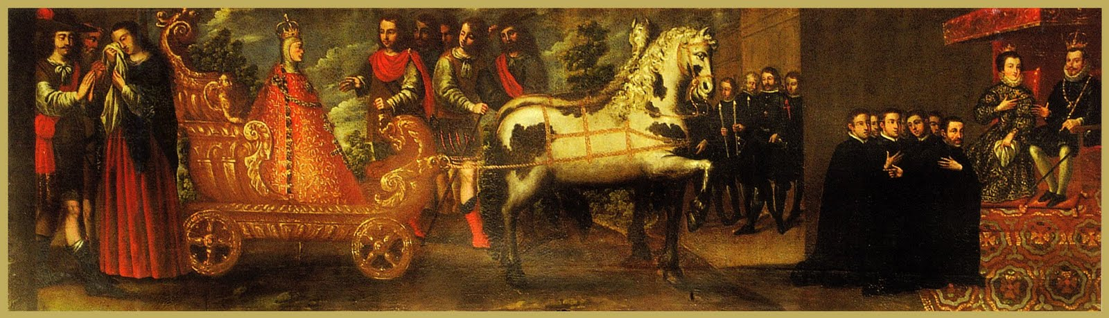 Forma parte de una serie de ocho escenas de la historia de la Virgen Vulnerata desde el ataque inglés a Cádiz a la adoración por Carlos II, hecho que no llegó a tener lugar.